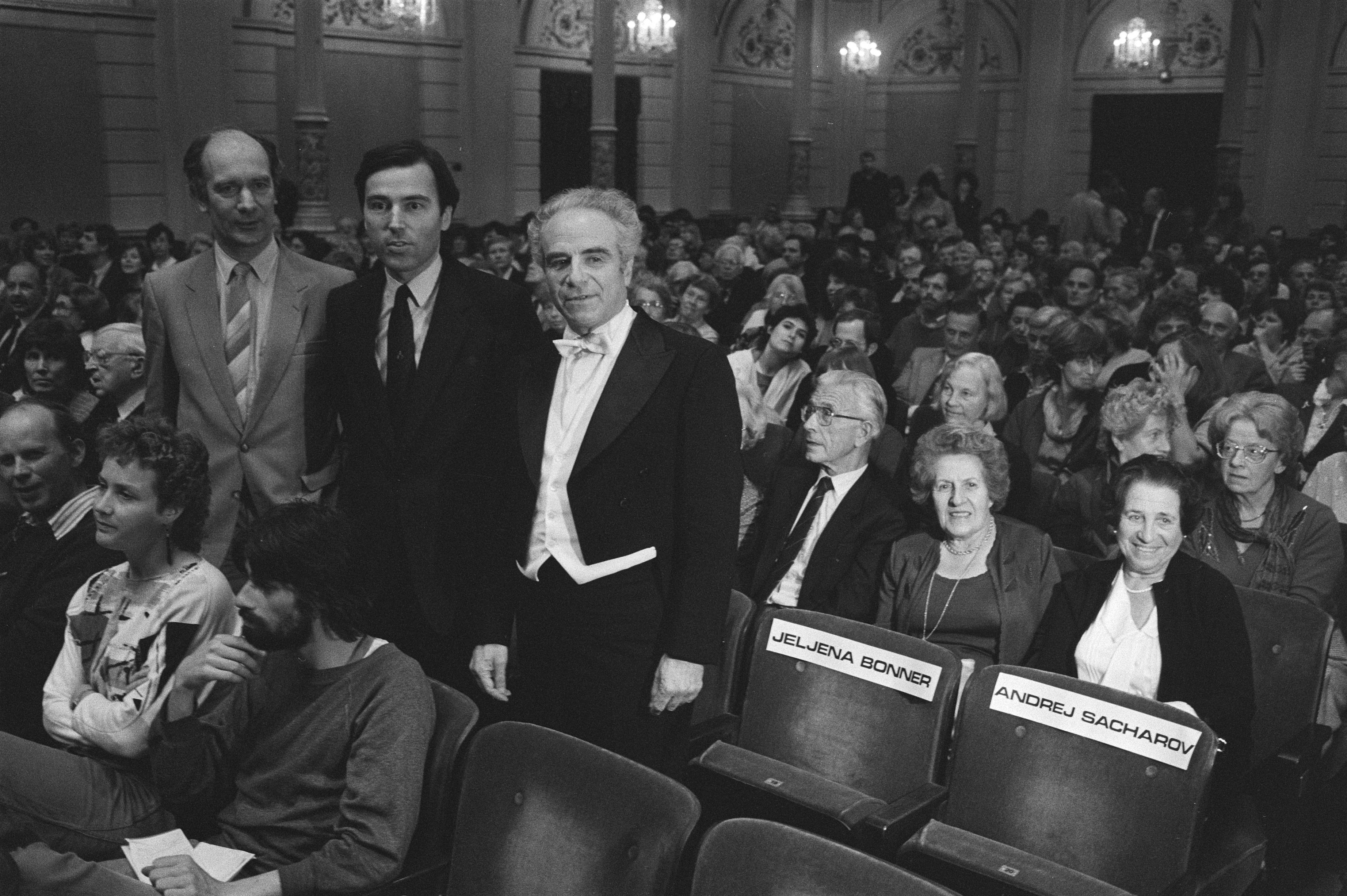 Collectie / Archief : Fotocollectie Anefo Reportage / Serie : [ onbekend ] Beschrijving : Benefietconcert voor Russische dissident Sacharov in Concertgebouw Amsterdam; vlnr De Vries (CDA), Brink (WVC) en dirigent Gossman en lege stoelen voor Sacharov Datum : 24 mei 1984 Locatie : Amsterdam, Noord-Holland Trefwoorden : CONCERTGEBOUWEN, dirigenten, politici Fotograaf : Antonisse, Marcel / Anefo Auteursrechthebbende : Nationaal Archief Materiaalsoort : Negatief (zwart/wit) Nummer archiefinventaris : bekijk toegang 2.24.01.05 Bestanddeelnummer : 932-9797